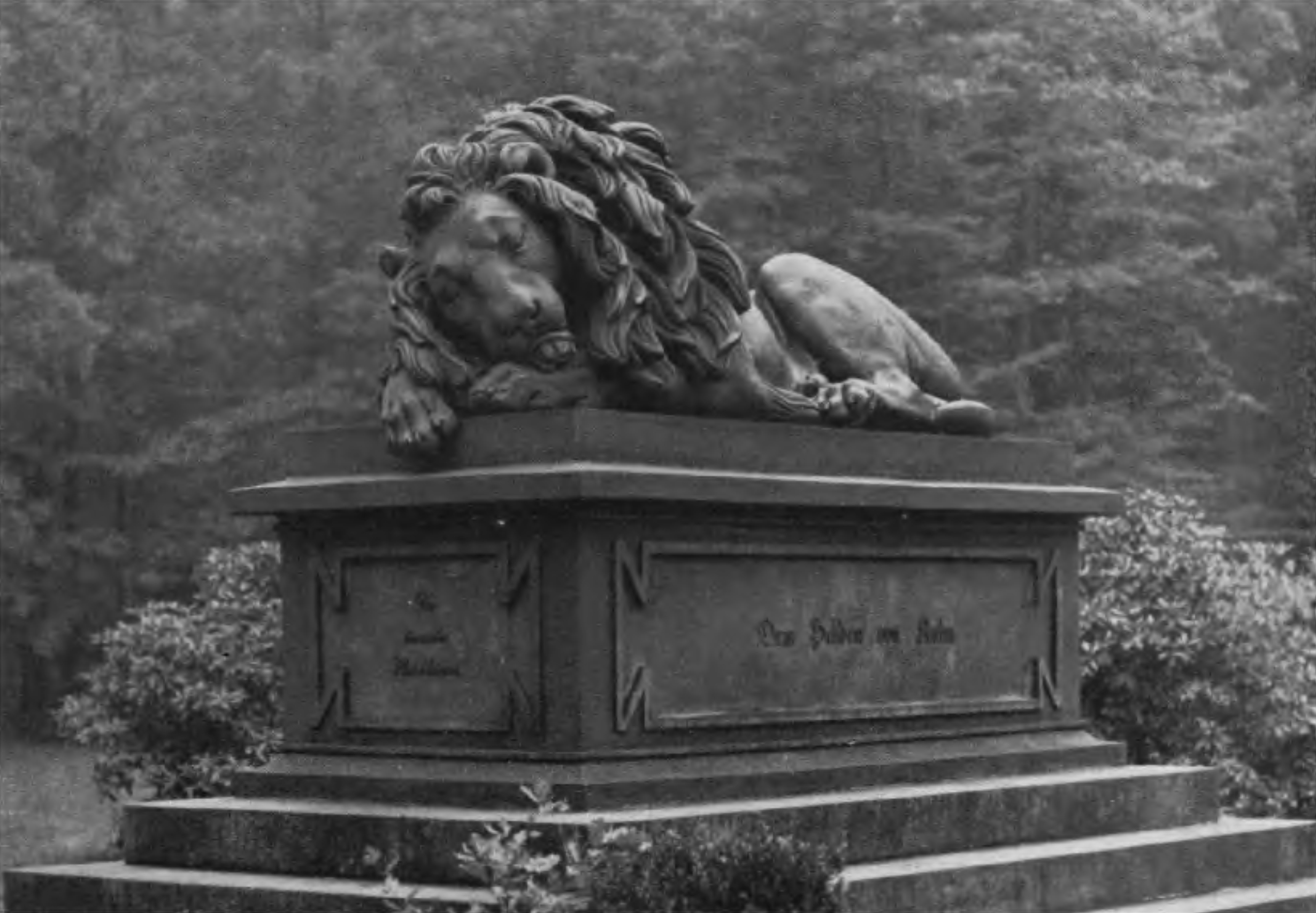 pomnik księcia Eugeniusza Wirtemberskiego przedstawiający odpoczywającego lwa (podpis oryginalny: Ruhender Löwe) w parku przypałacowym w Pokoju (Carlsruhe), odlew żeliwny z Gliwic; projekt zapewne Theodora Kalidego